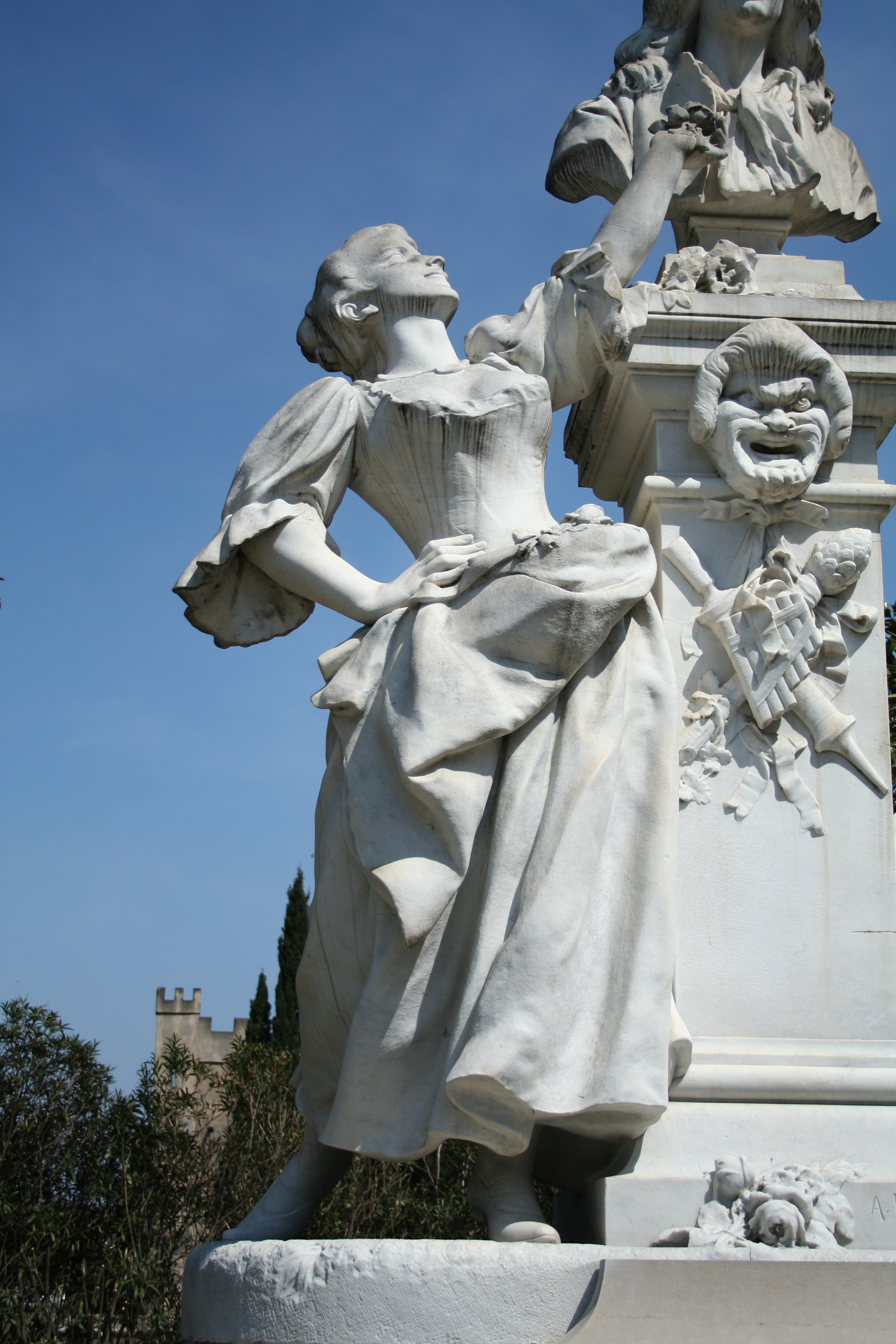 Pézenas (Hérault) - Monument à Molière, détail : soubrette, représentant la Lucette de Monsieur de Pourceaugnac - Sculpture d'Injalbert.